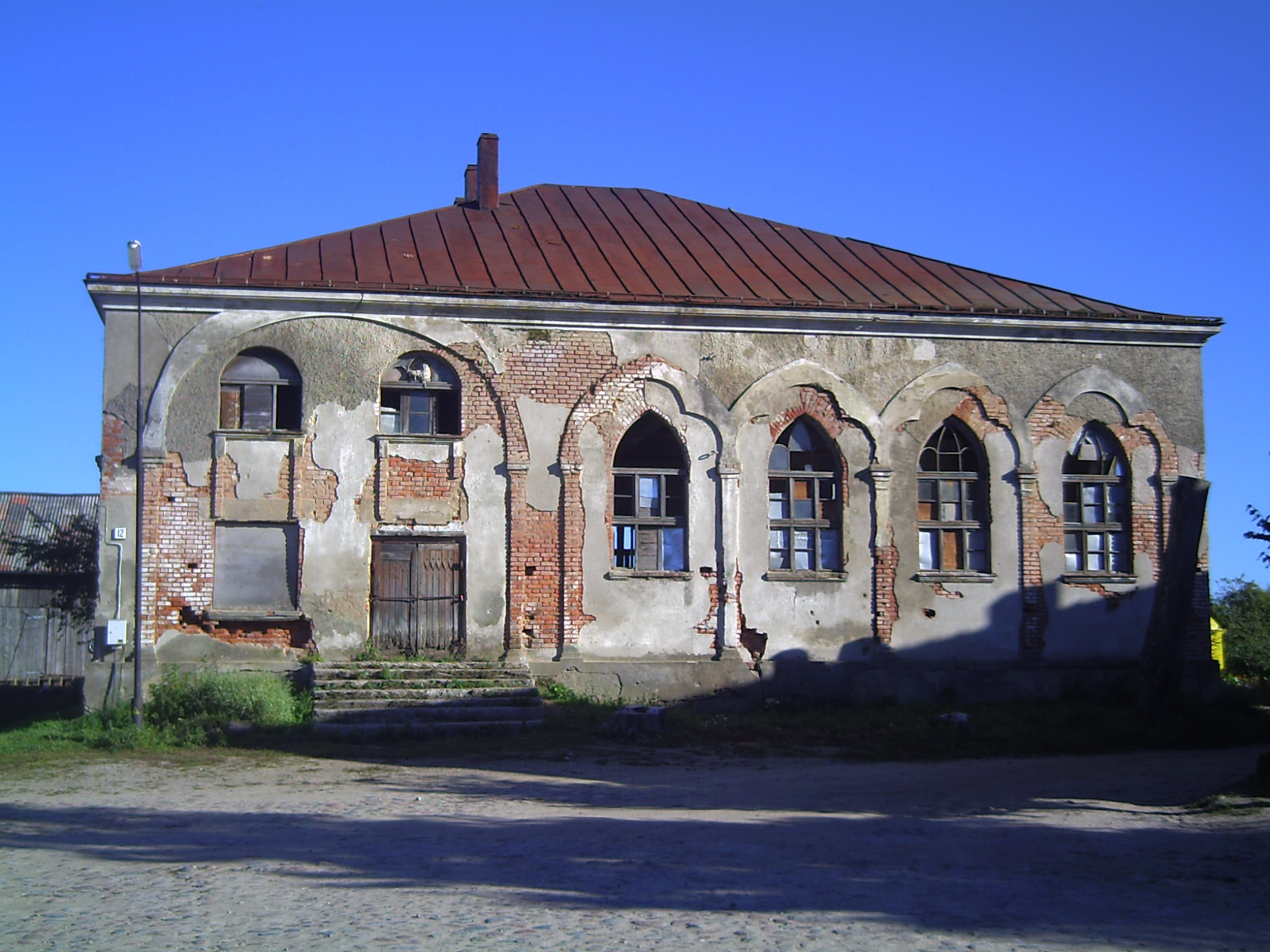 Synagoge in Švėkšna, Distrikt Klaipeda, Litauen. Unknown